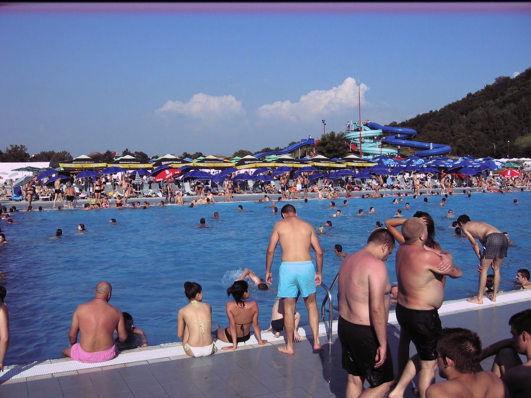 Akva park Jagodina